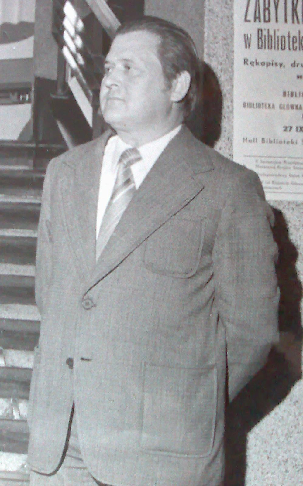 Andrzej Szefer.